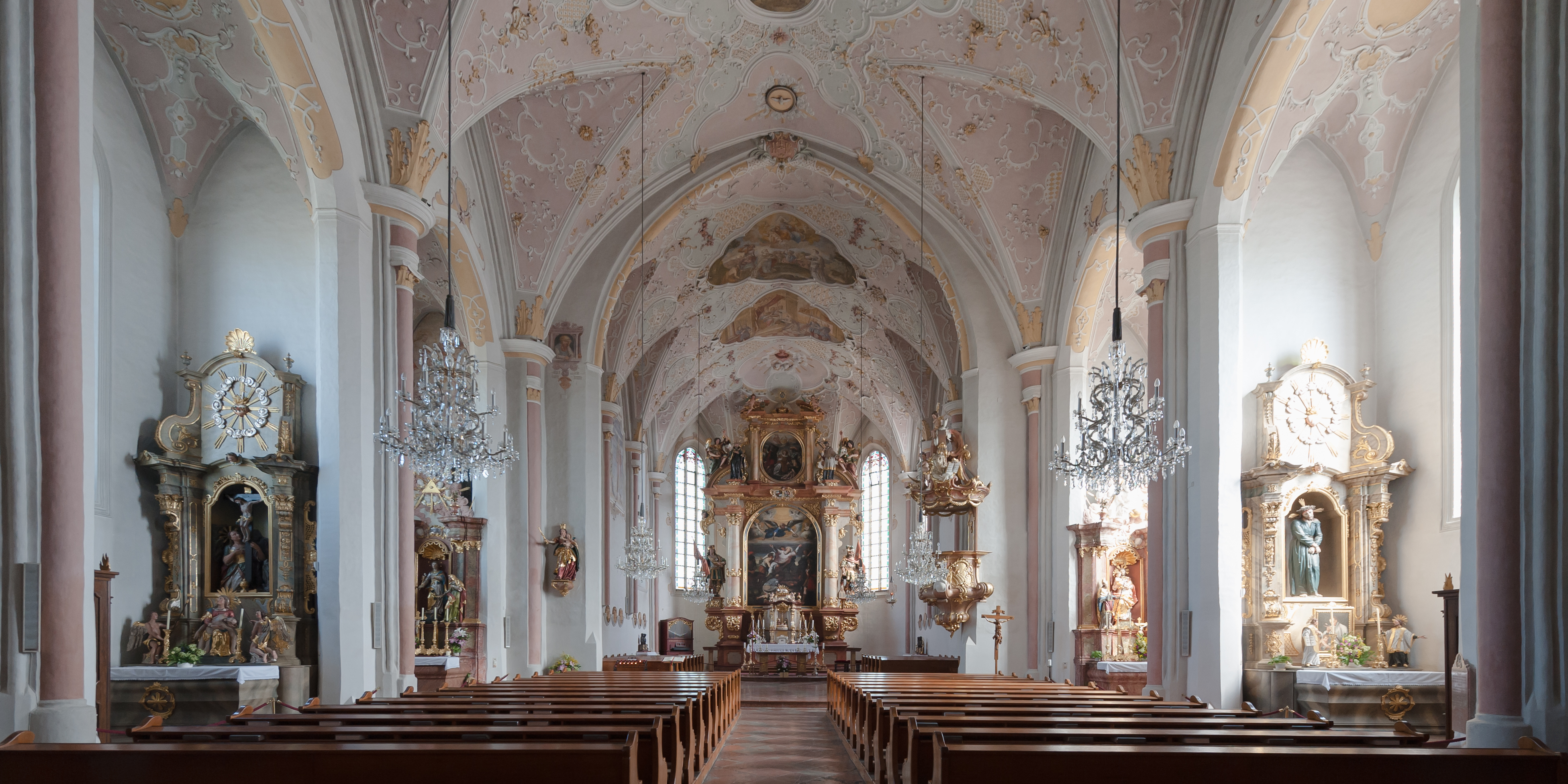 Altheim: Kath. Pfarrkirche hl. Laurenz und Friedhof